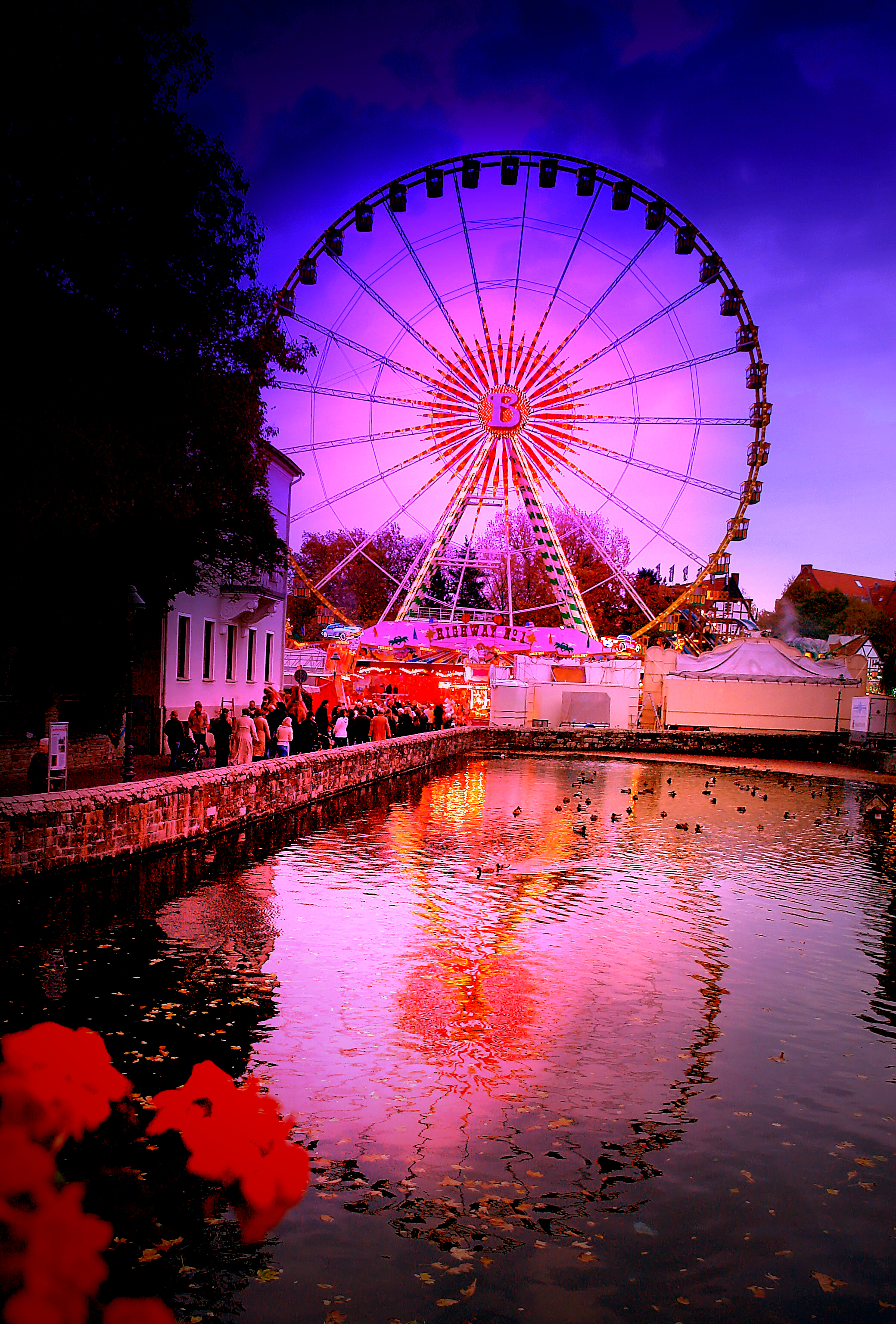 Das Riesenrad, dass sich im Großen Teich widerspiegelt, wurde am 8.11.2006 gegen 18.00 Uhr mit einer Sony R1 auf der Soester Allerheiligenkirmes aufgenommen.